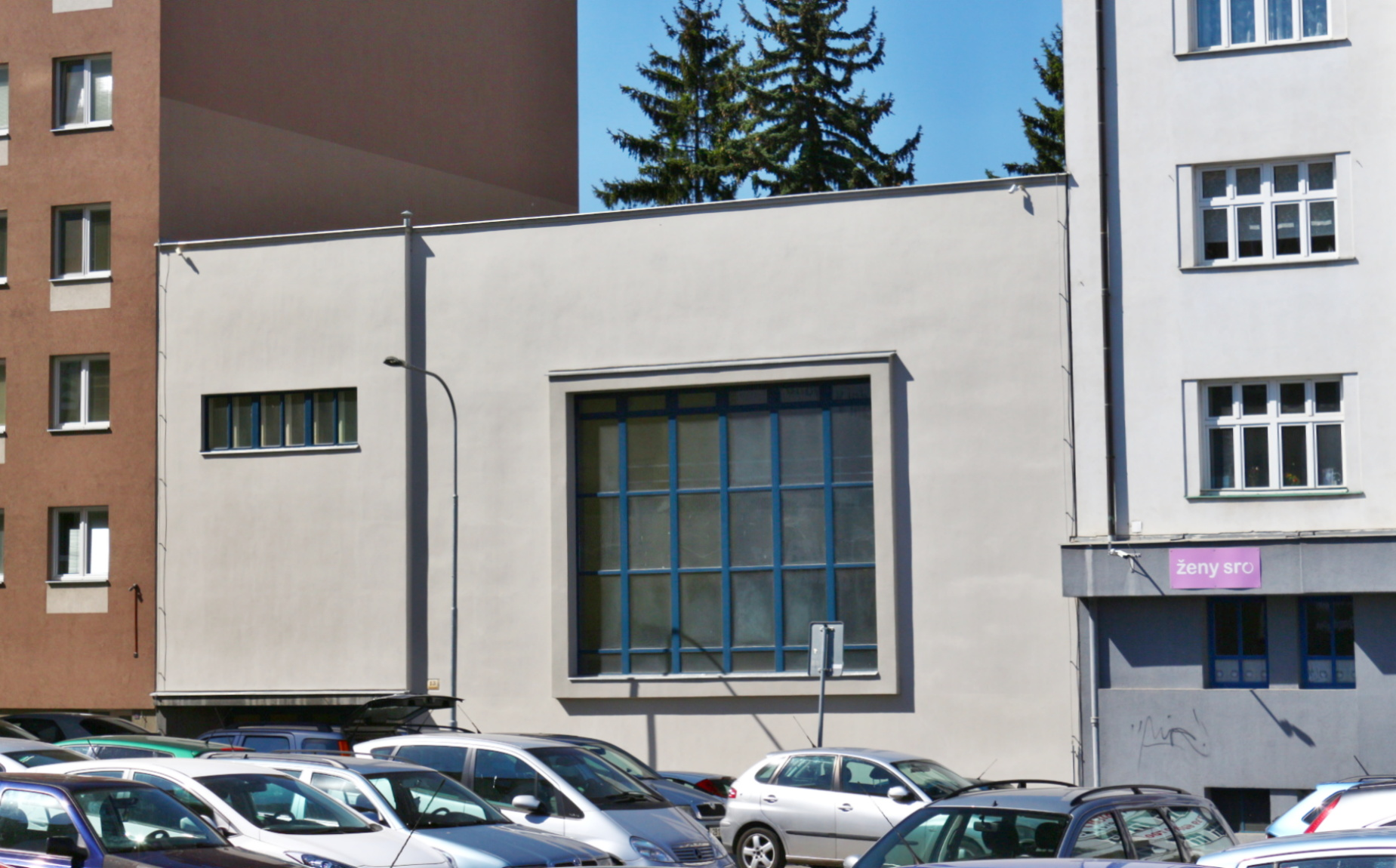 Synagoga Agudas achim, Brno